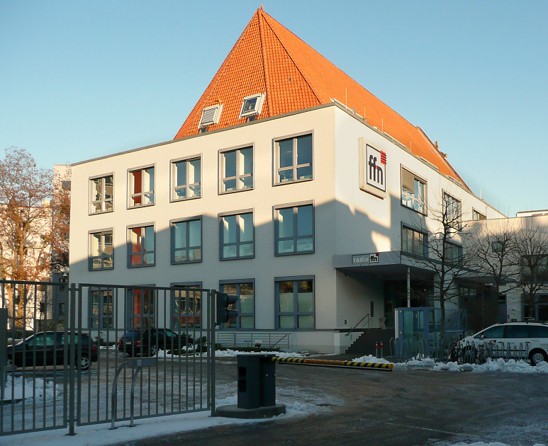 Studiogebäude von radio ffn in Hannover